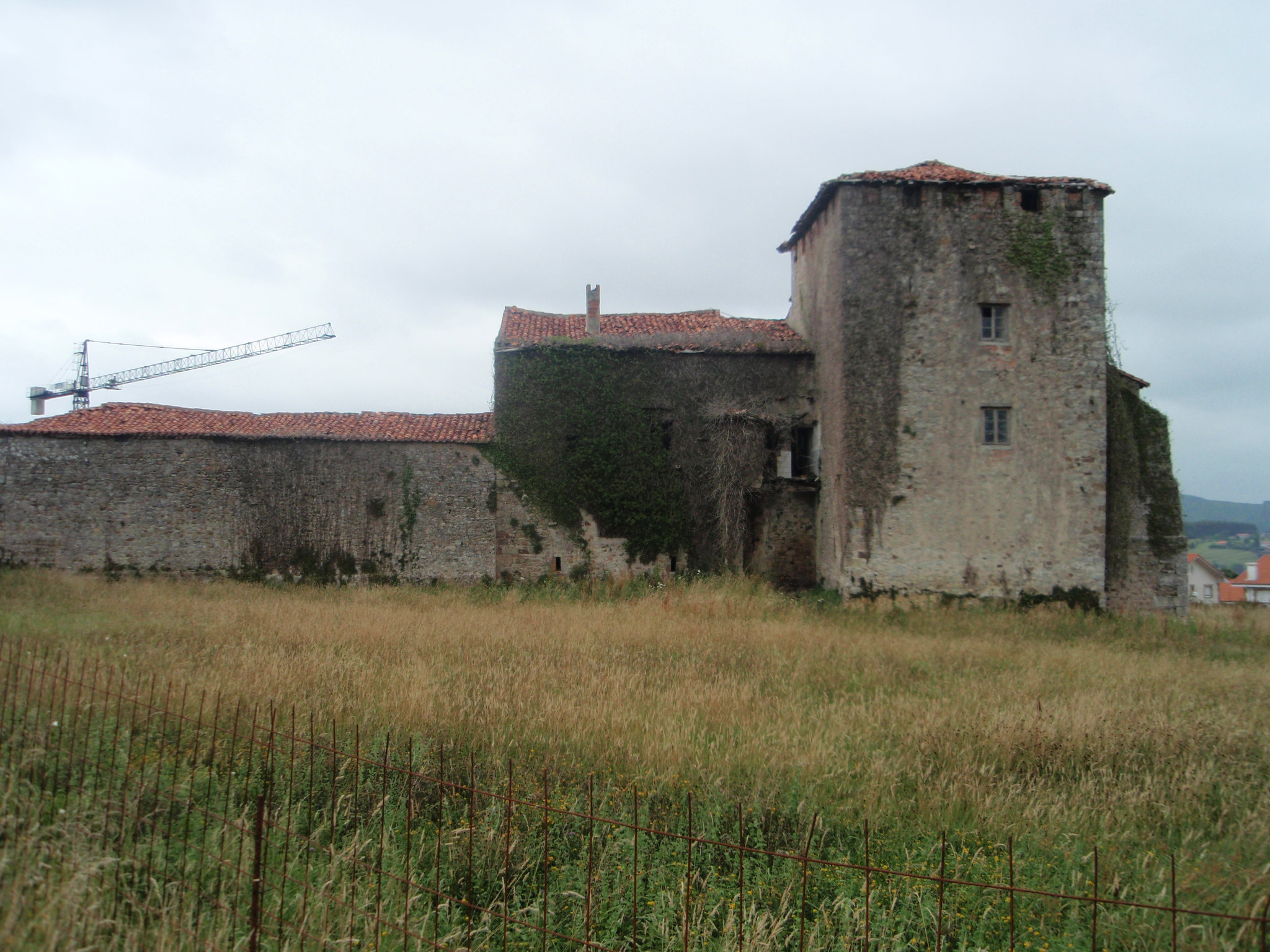 Torre de los Calderón de la Barca en Viveda, Cantabria (España)